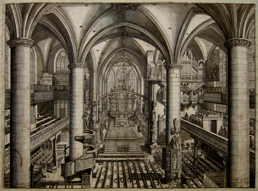 Johann Andreas Graff (1637-1701): Inneres der Frauenkirche in Nürnberg, Kupferstich, gestochen von Johann Ulrich Kraus aus Augsburg, 1696; 42 x 57 cm